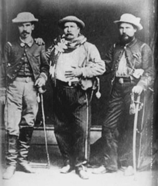 General Manuel Lisandro Barillas junto a su padre y hermano